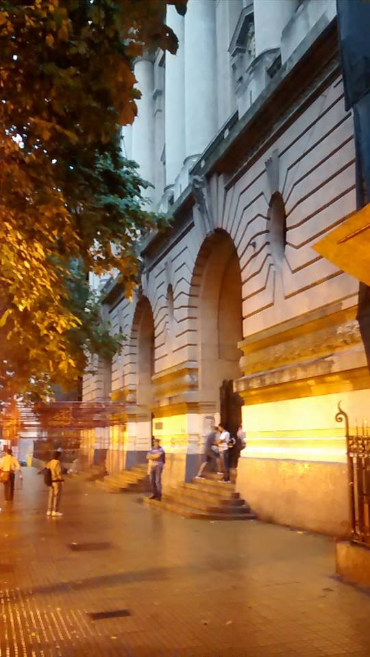 Colegio Nacional de Buenos Aires - 2015 01, 07:48 AM vista del frente.